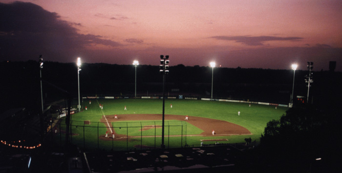 In eigen beheer geproduceerde foto van het eerste veld van de HCAW Base- and softbalvalley, genomen vanaf de vierde verdieping van de achterliggende flat in 2006.